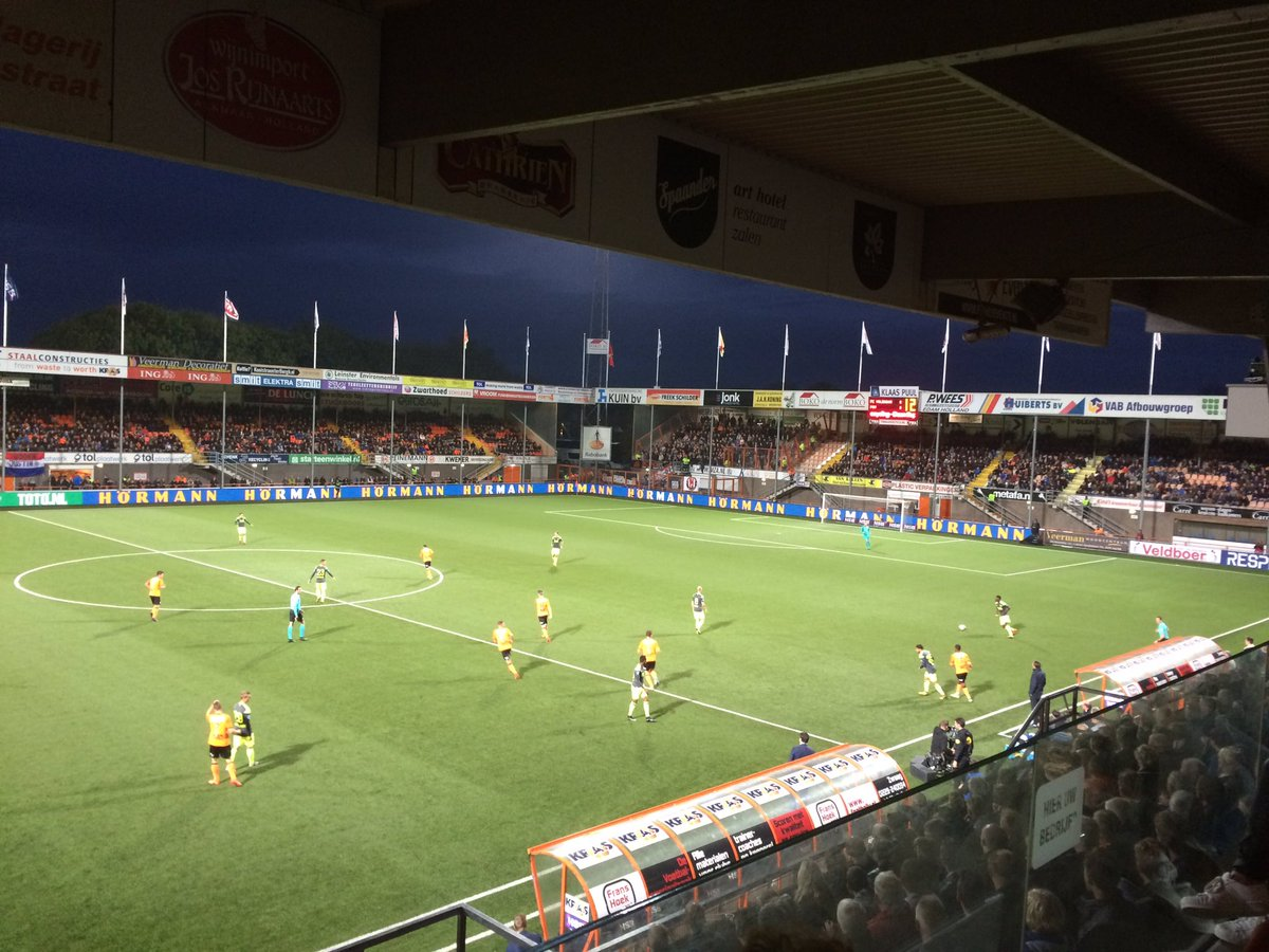 FC Volendam tegen PSV. Tweede ronde KNVB Beker.